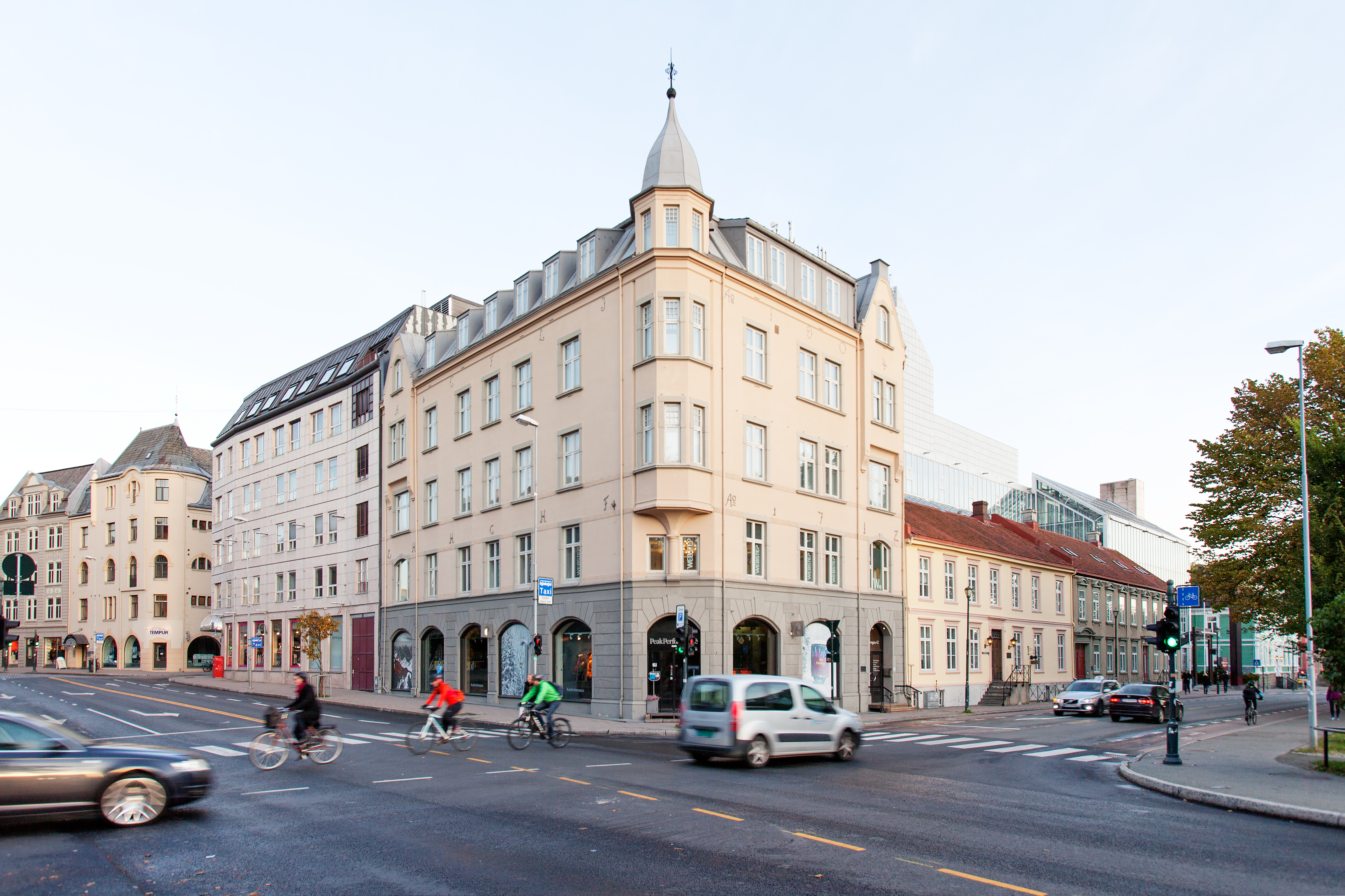 Musikkbiblioteket ligger i 3. etasje i Kjøpmannsg. 42